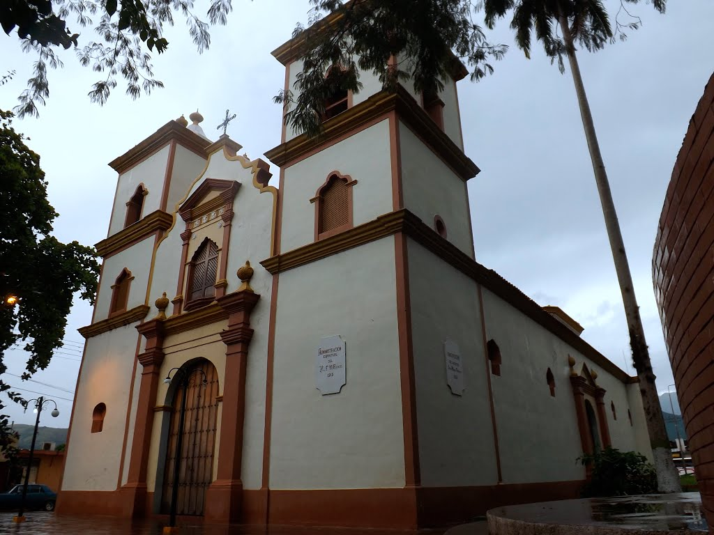 Construida por el Señorio San Baltazar de los Arias